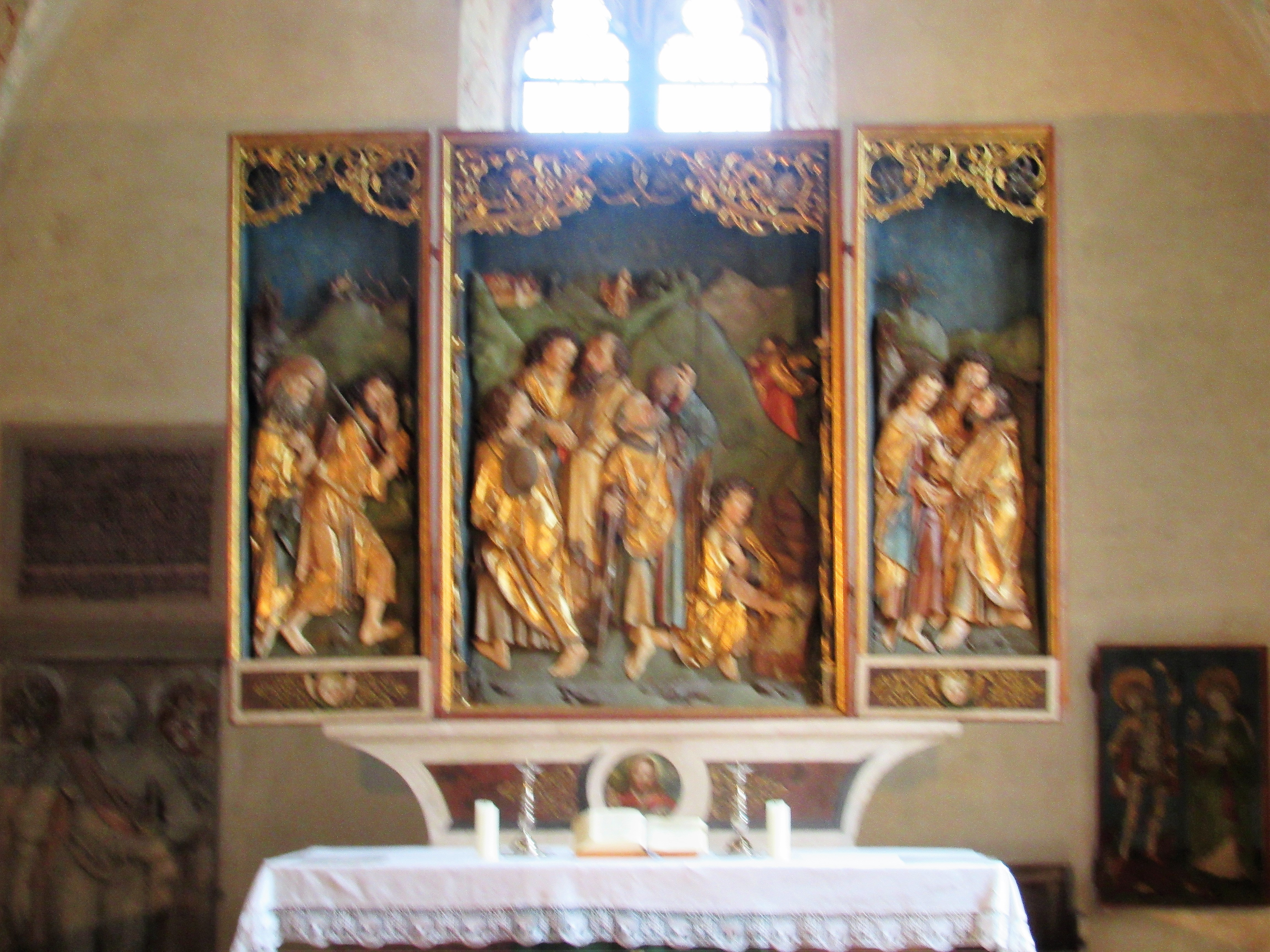 Der Apostelabschiedsaltar von Tilman Riemenschneider